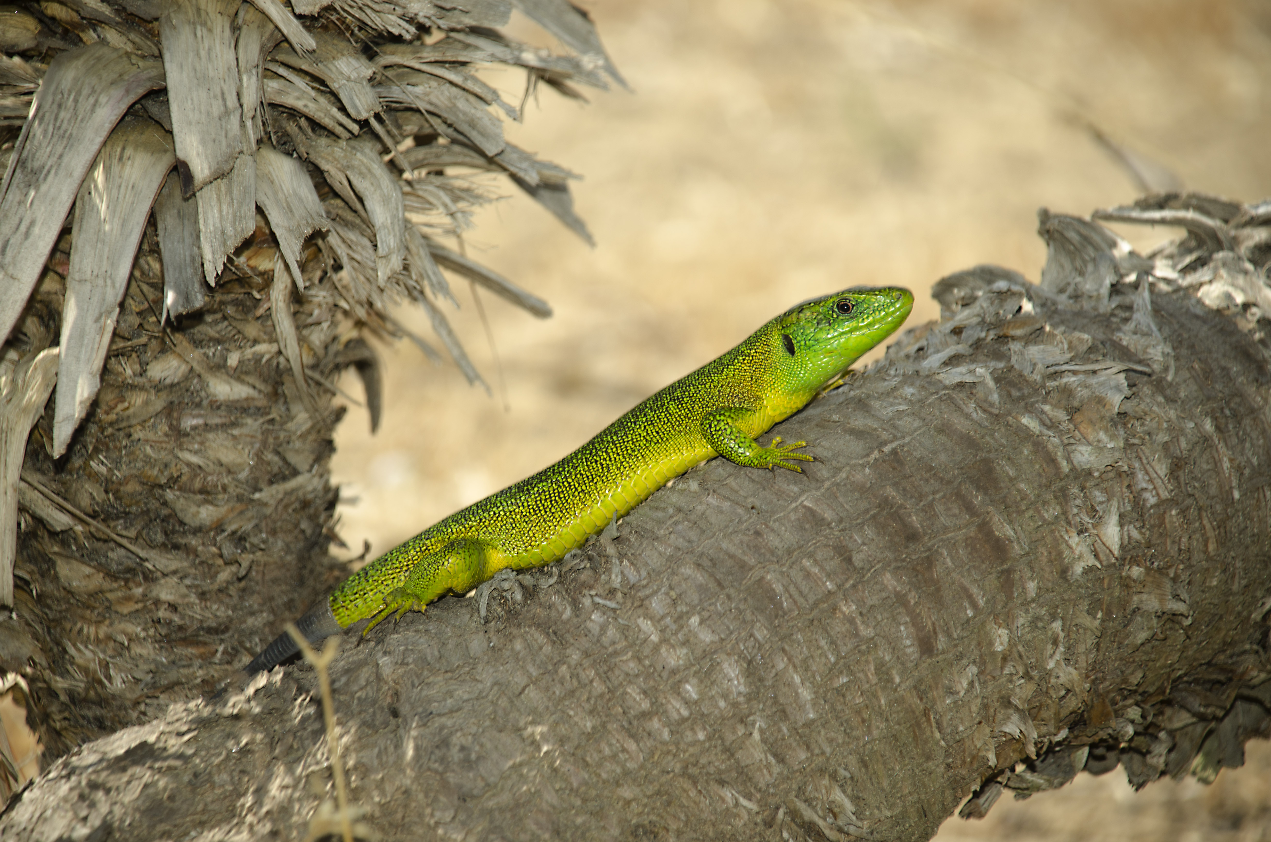 Westliche Smaragdeidechse (Lacerta bilineata), aufgenommen in den Stranddünen von Cavallino, Italien